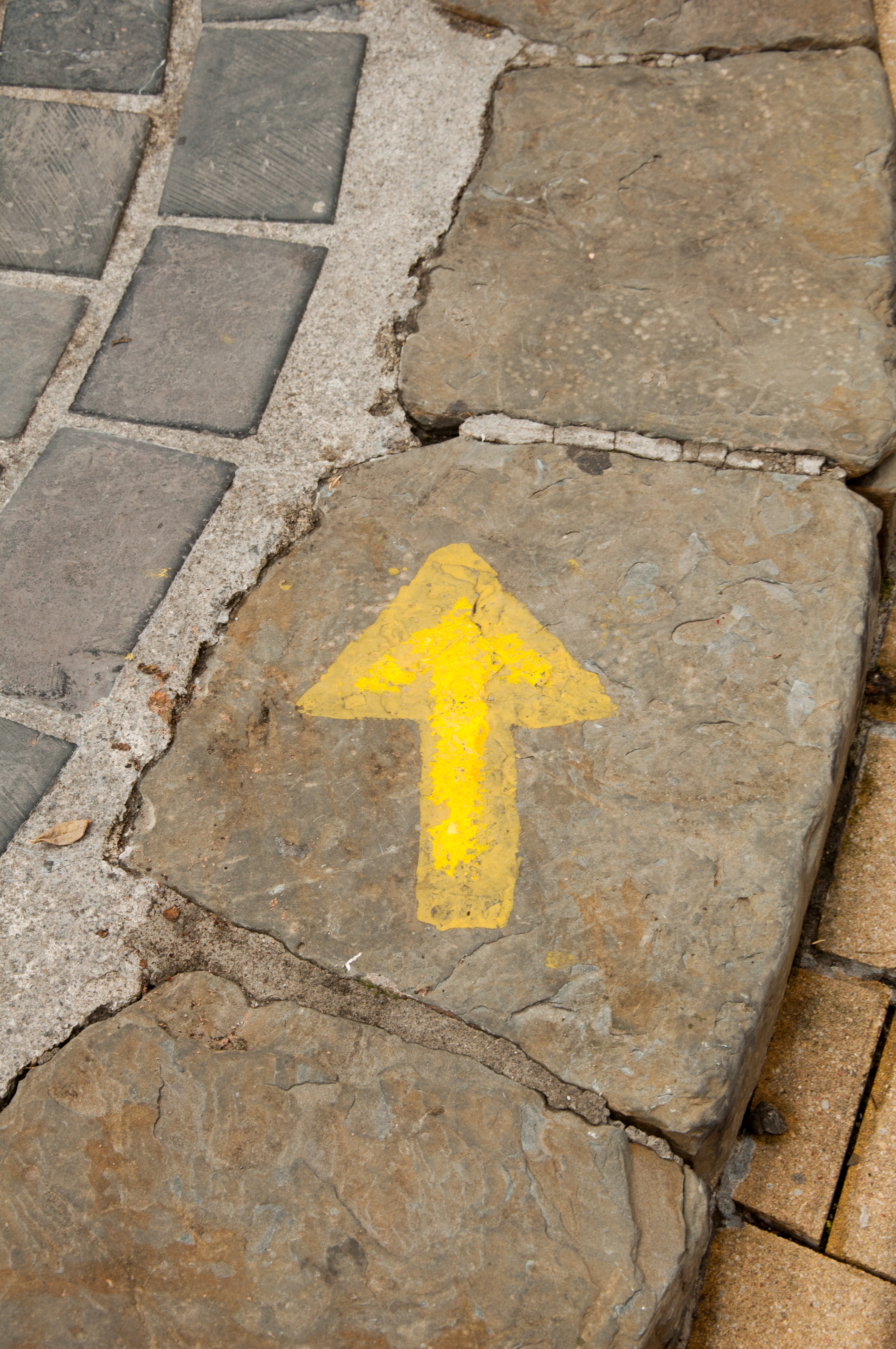 Donejakue bidean zehar erromesak gidatzeko ezarritako gezi horietako bat.